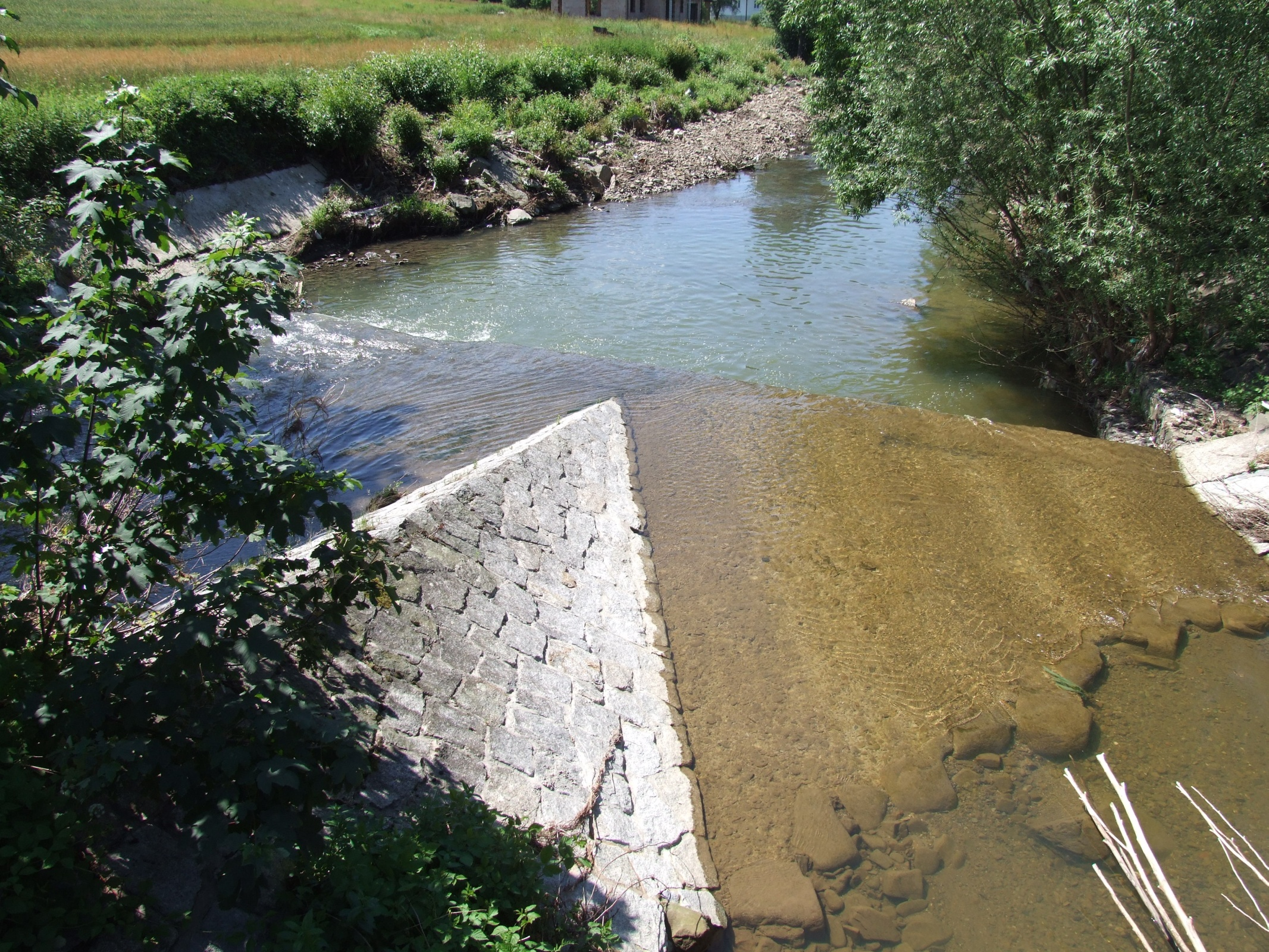 Trzemeśnianka w Trzemeśni, przy ujściu Zasanki.